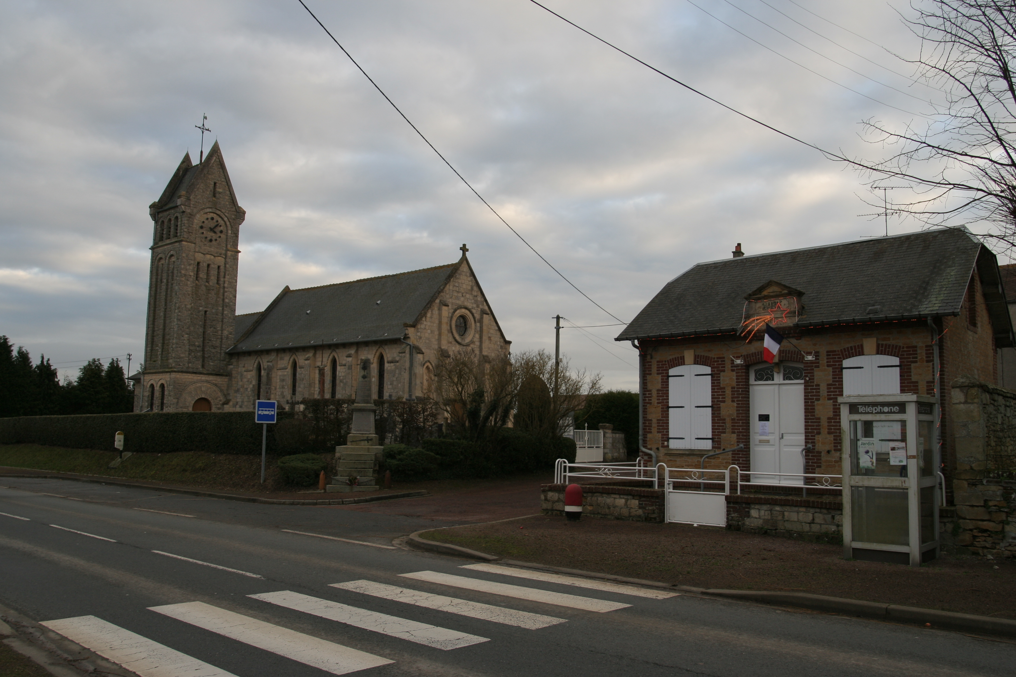 Église et mairie de Goustranville.